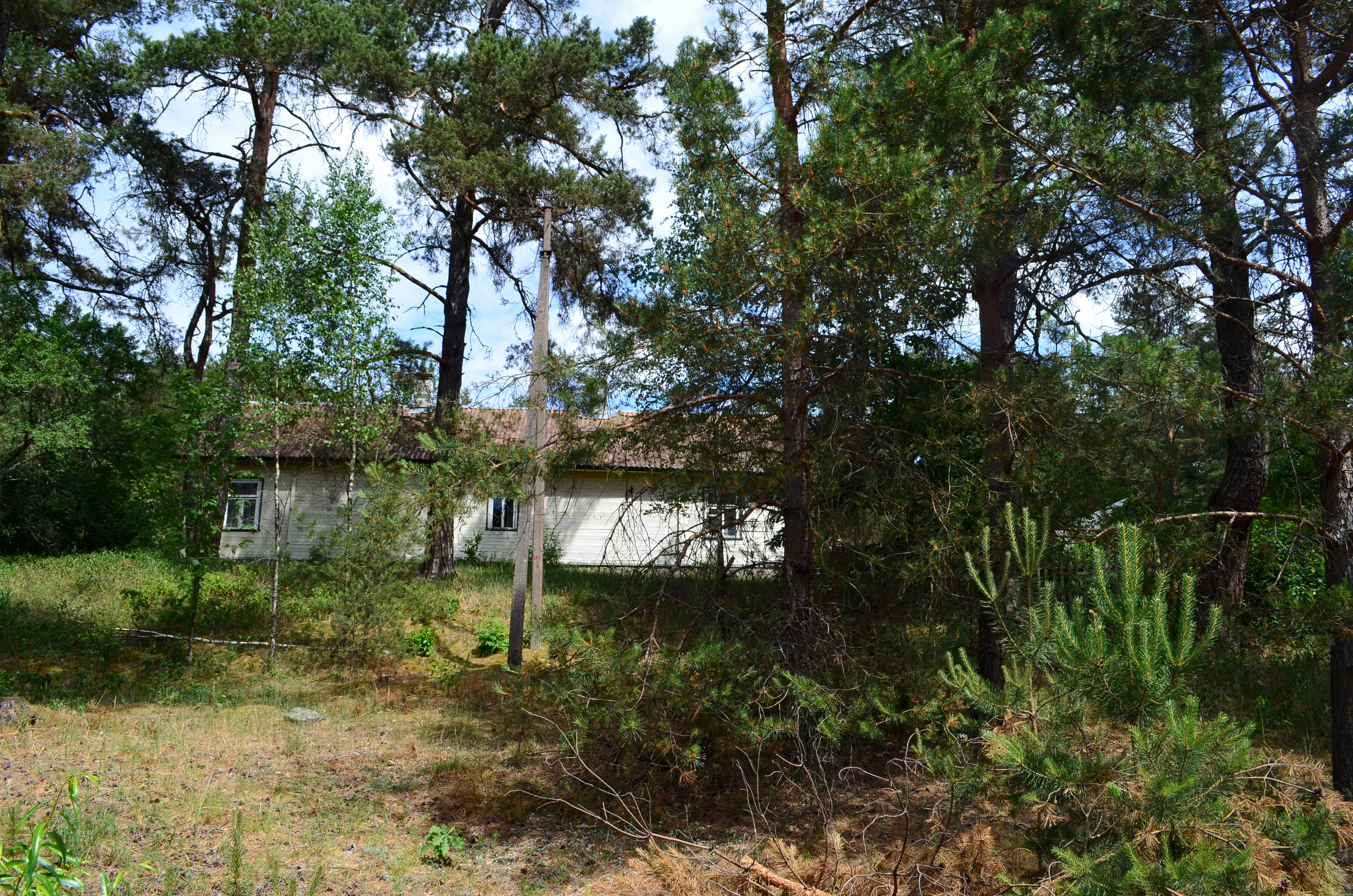 Pašilingė, Varėnos raj.